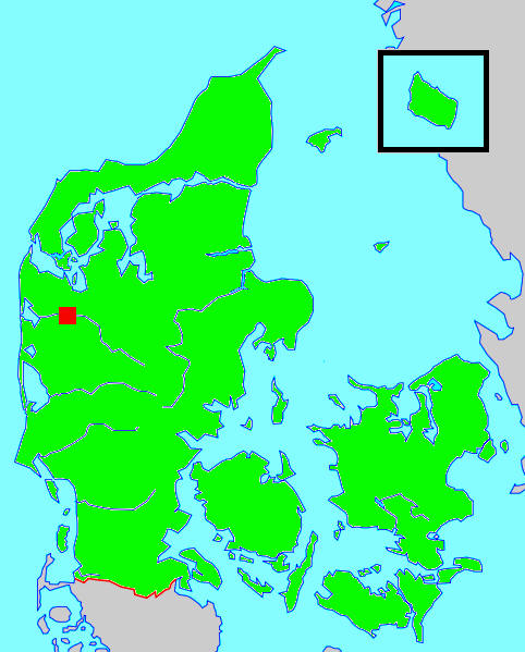 Kort sem sýnir staðsetningu Holstebro í Danmörku.